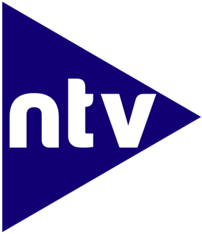 Logo Nusantara TV sejak tahun 2020